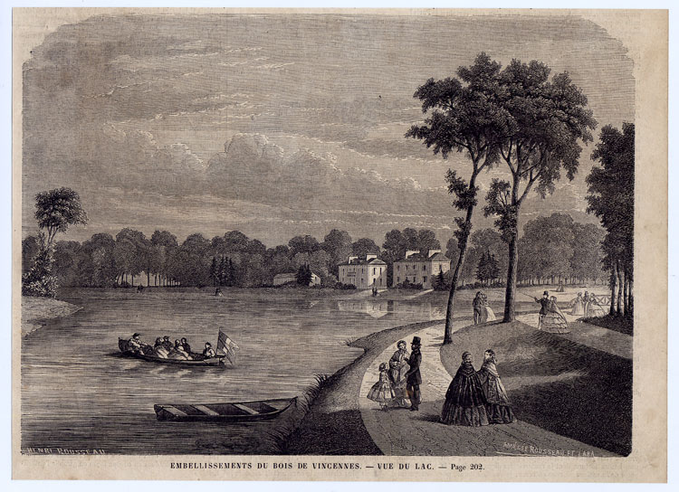 Henri Rousseau: Embellisements du Bois de Vincennes. - Vue du Lac (1860), Gravure, l'Univers Illustré, figurant le Lac des Minimes dans le Bois de Vincennes à Paris, XIIe arrondissement.